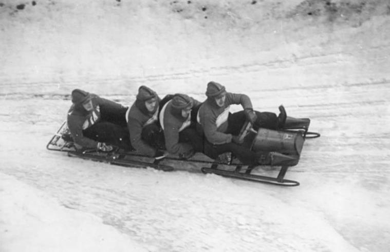 Oberhof, II. Wintersportmeisterschaften, Bobfahren Illus TBD 21.2.51 Die II. Wintersportmeisterschaften der Deutschen Demokratischen Republik vom 11.-18.2.51 in Oberhof. UBz: Ein Viererbob saust durch die Bahn.